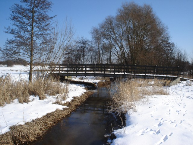 Nivaa, Demmark